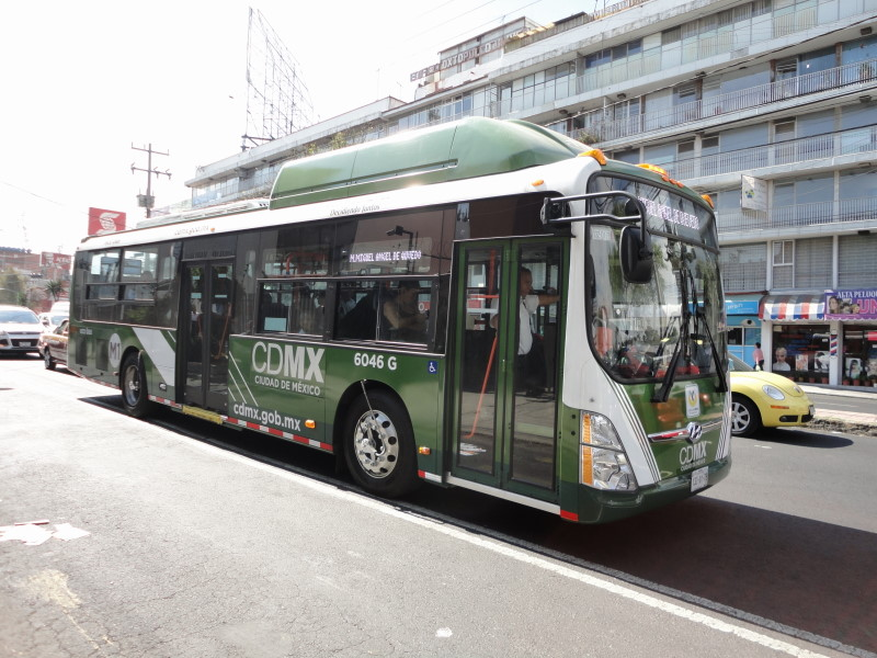 Uno de los autobuses Hyundai Super Aero City Low Entry impulsado a Gas Natural Comprimido, que cubre la ruta verde Miguel Ángel de Quevedo a Santa Fe.